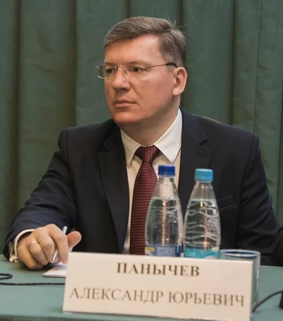 Ректор ПГУПС Александр Юрьевич Панычев